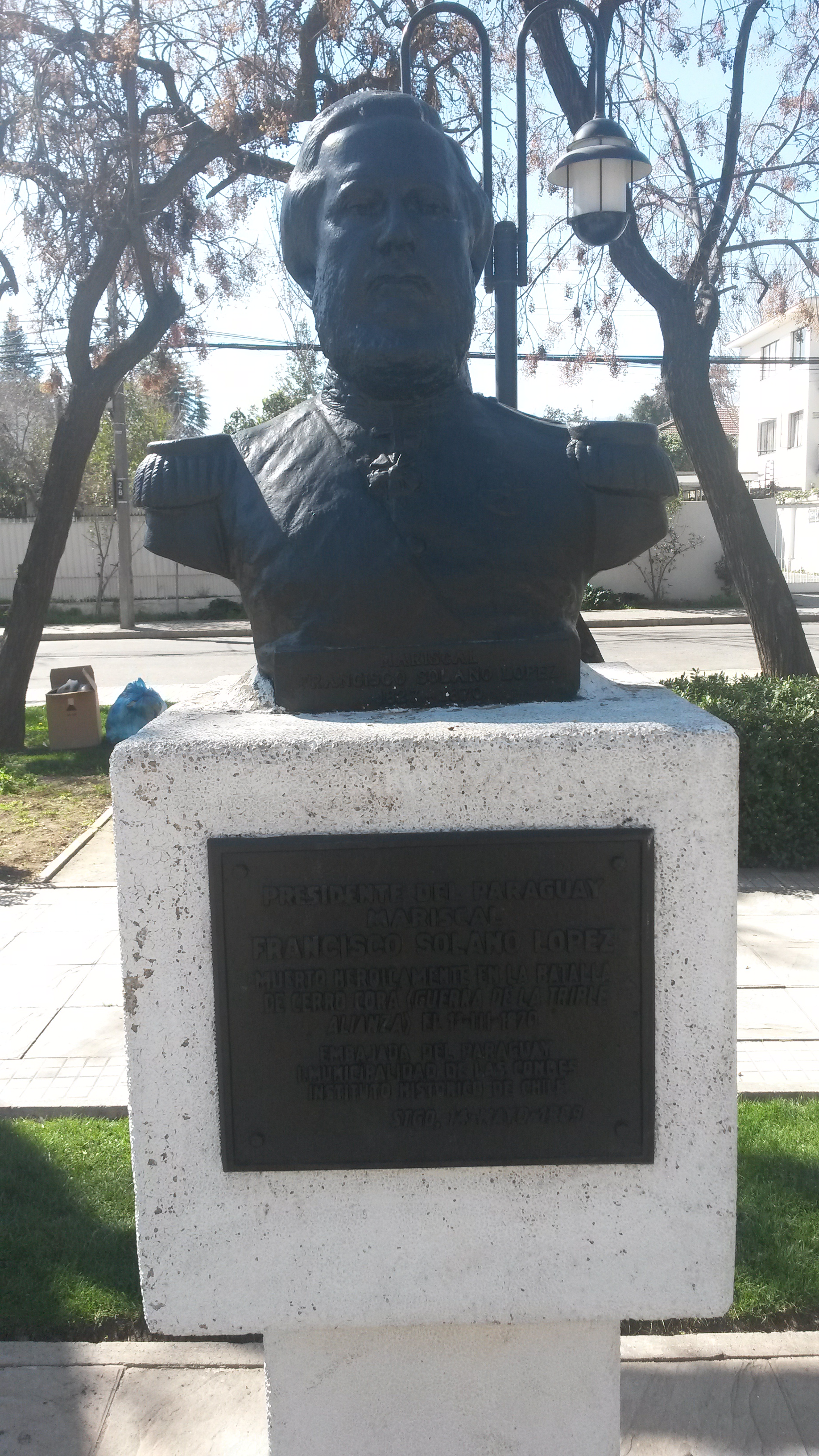 Busto del Mariscal Francisco Solano López, en la Plaza República del Paraguay en Las Condes, Santiago de Chile